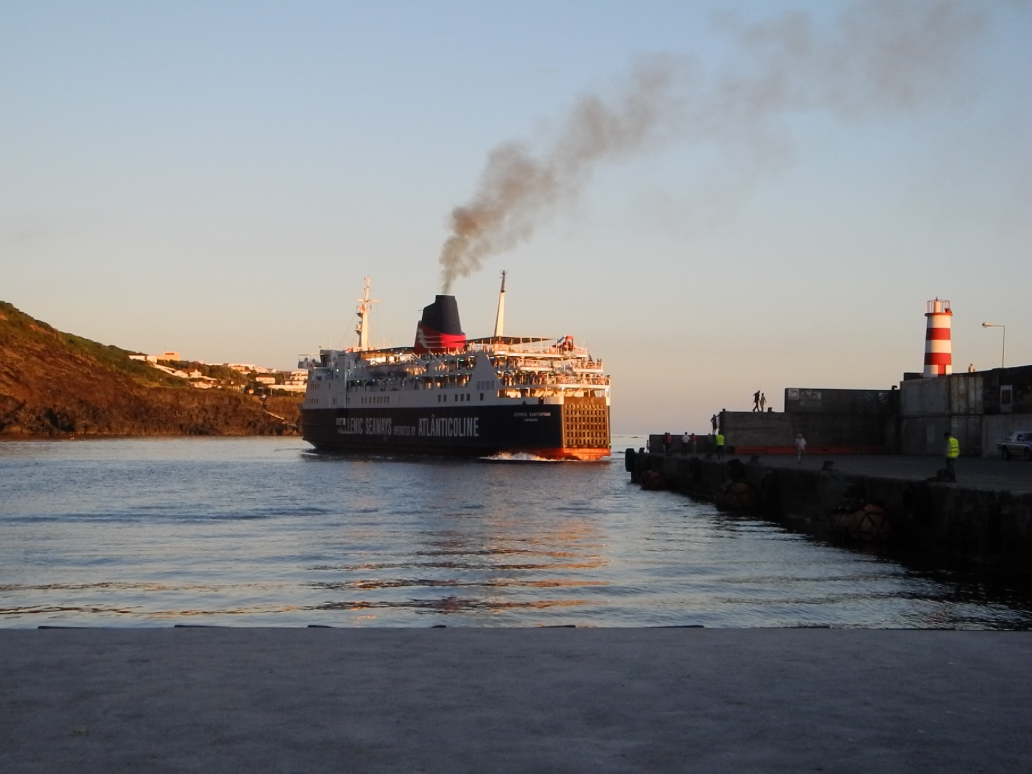 Velas - Fähr- und Fischereihafen, Autofähre